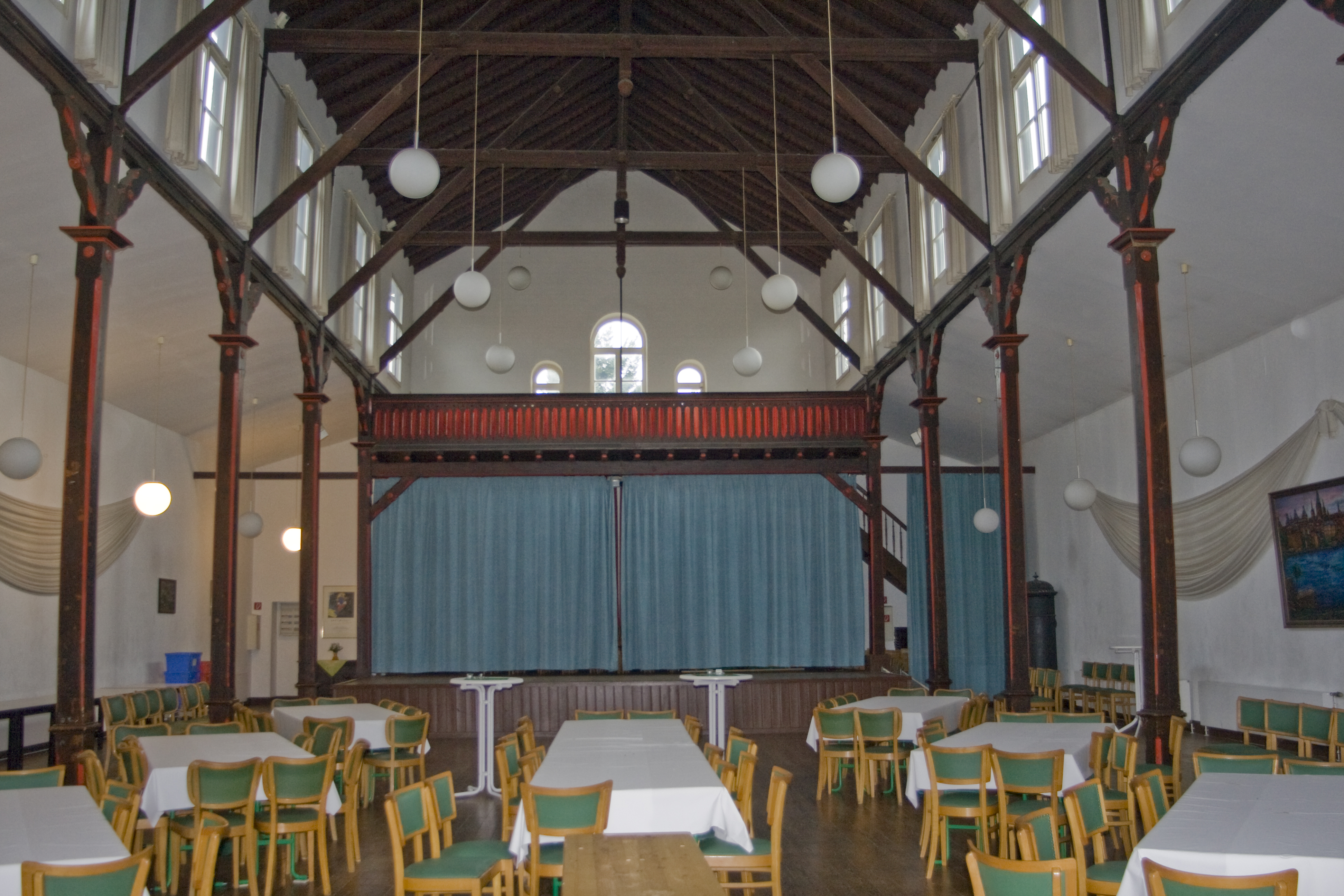 Kleine Beethovenhalle, Innenansicht mit Stützen und Obergaden, Ortsteil Muffendorf in Bonn-Bad Godesberg